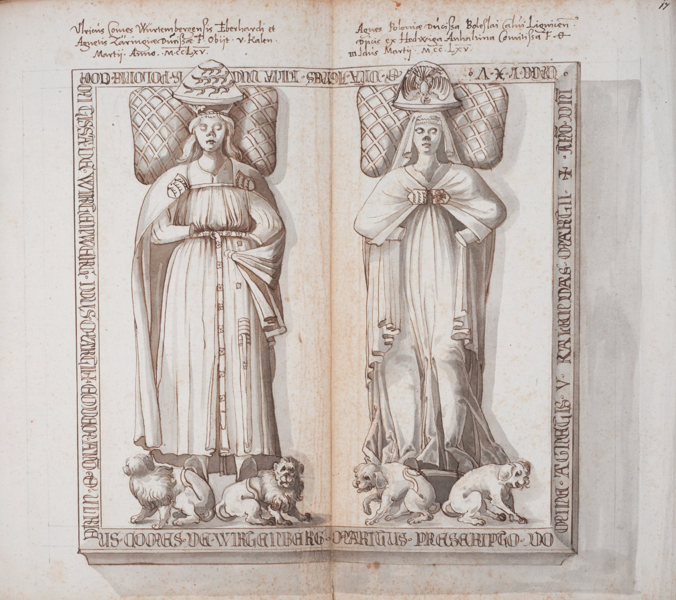 Memoriae posteritatique inclytae domus Wirtembergicae sacrum, 1583. (Nachbildungen alter Grabsteine des Württembergischen Fürstenhauses). Stuttgart, Württembergische Landesbibliothek, Cod.hist.fol.130 links: Ulrich I., Graf von Württemberg, auch Ulrich der Stifter oder Ulrich mit dem Daumen, (* 1226; † 25. Februar 1265), Beschreibung: Vlricus Comes Würtembergensis Eberhardi et Agnetis Zäringiae Ducissae .F. Obijt .V. Kalen. Martij. Anno. M.CCLXV. rechts: Agnes von Schlesien-Liegnitz, Beschreibung: Agnes Poloniae Ducissa Boleslai Calui Lignicen. Ducis ex Hedwiga Anhaltina Comitissa F. O. m. Idiis Martij. M.CC.LXV.